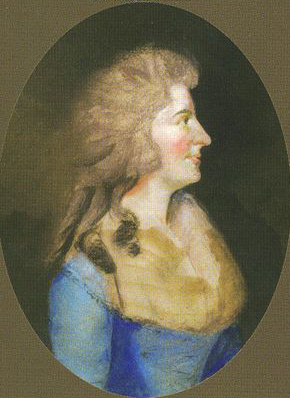 Sophia Corri-Dussek, 1775–1831, schottische Sängerin, Harpinistin und Komponistin. Zeitgenössisches Gemälde